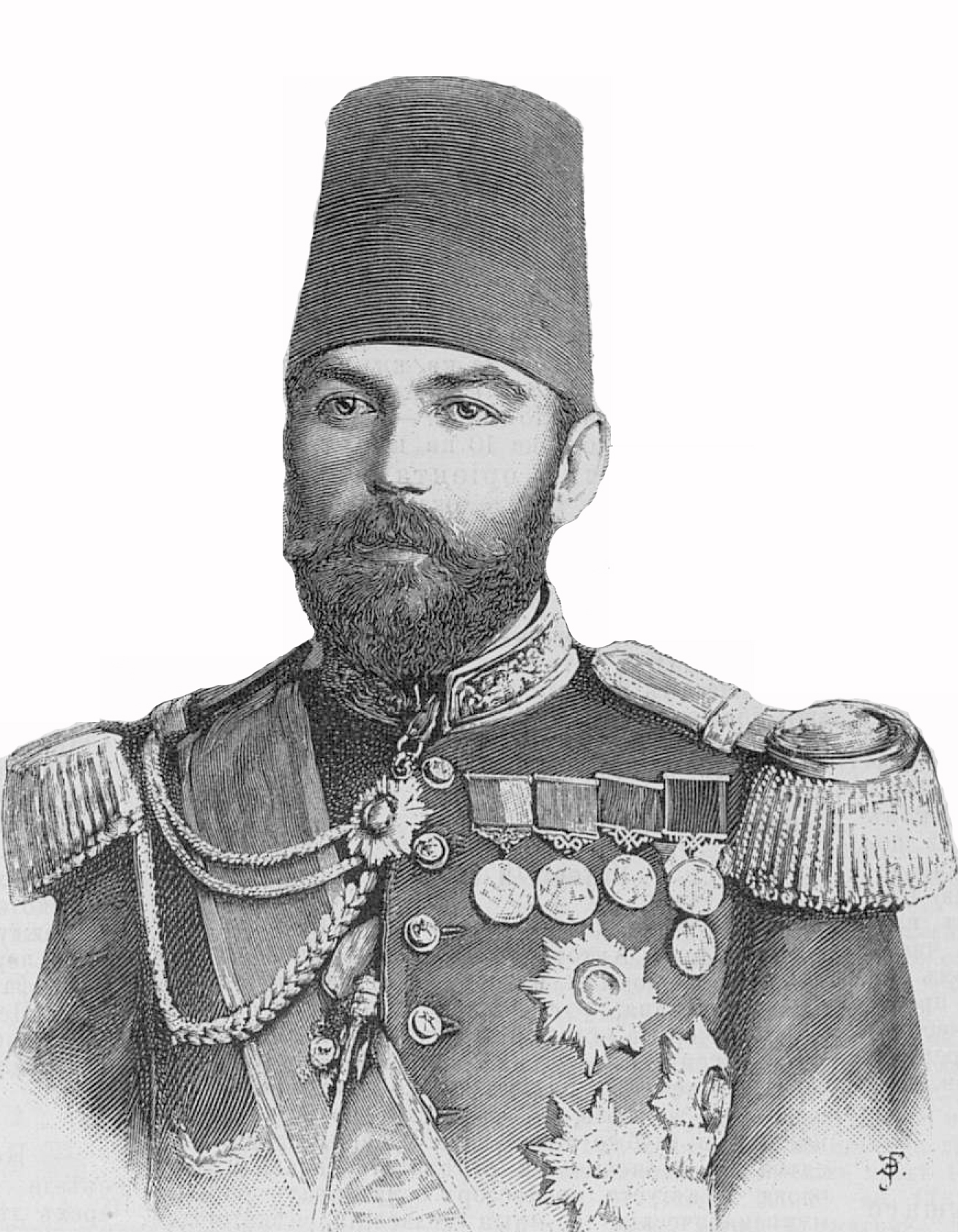 Ахмед Джевад-паша